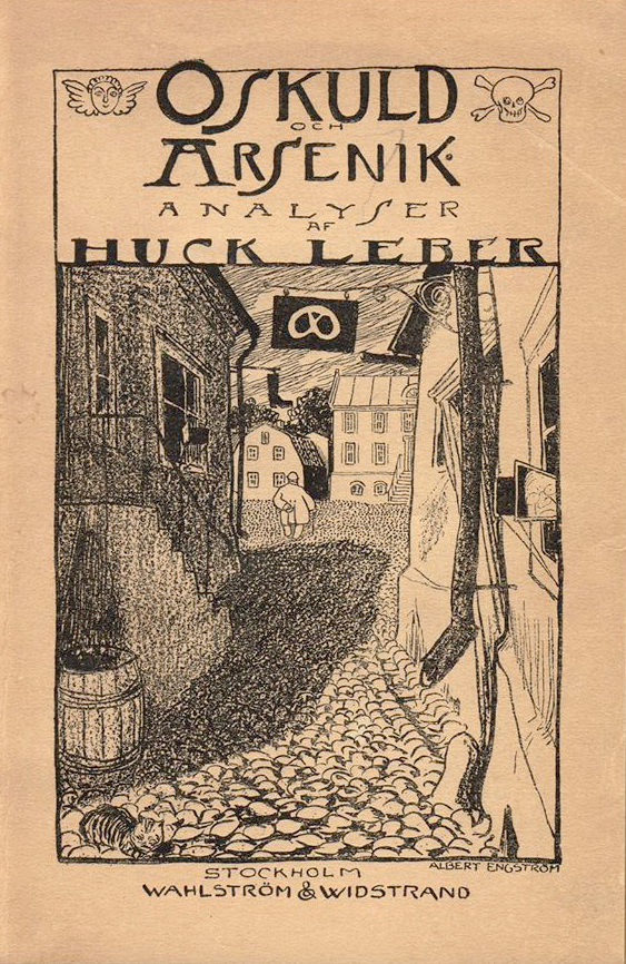 Book cover: Oskuld och arsenik by Klara Johansson